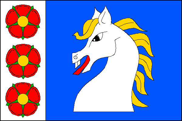 Vlajka, Útěchov, okres Svitavy